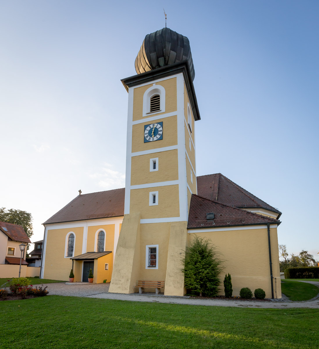 Evang.-Luth. Kirche St. Michael